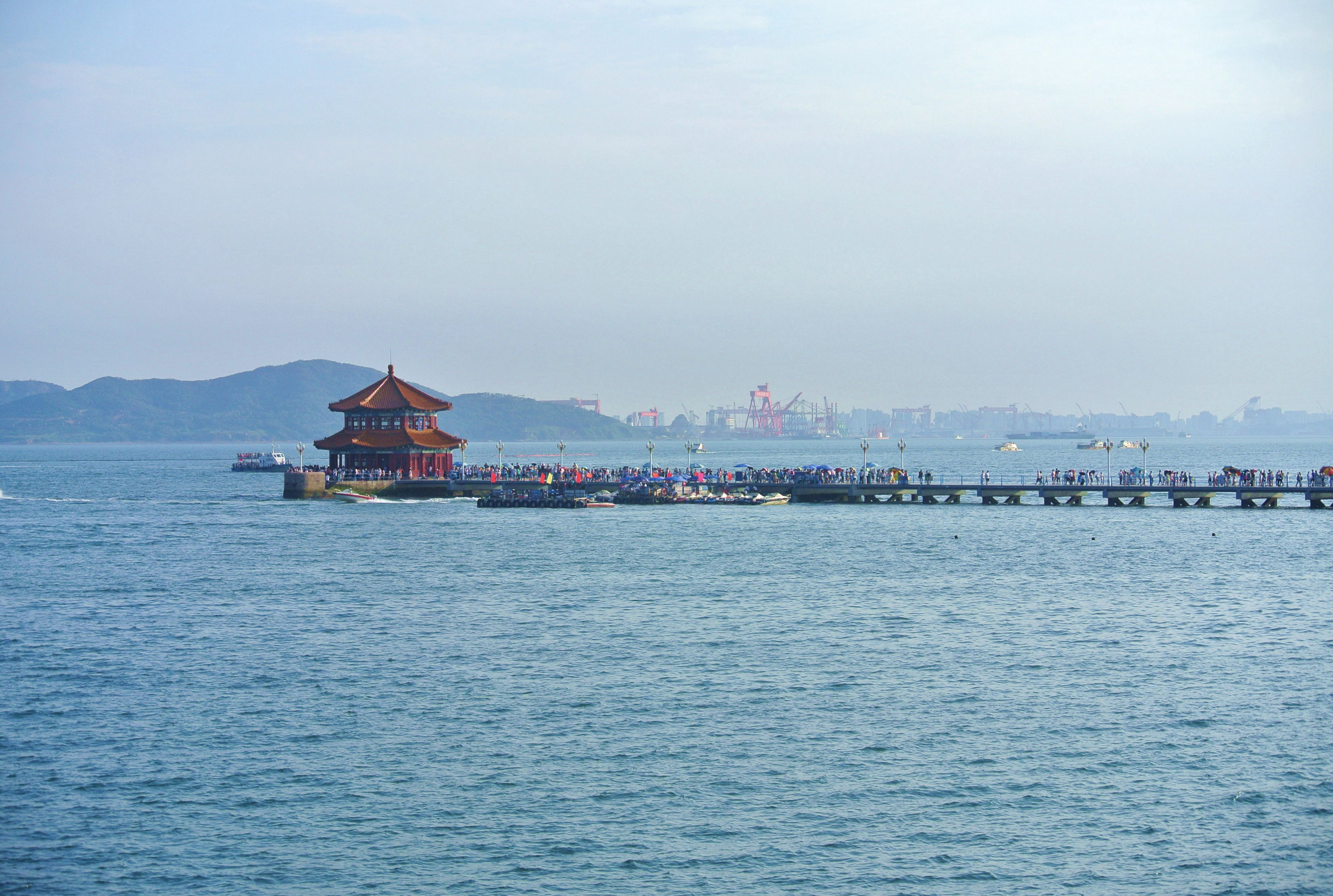 青岛栈桥 Ehemalige Landungsbrücke Qingdao